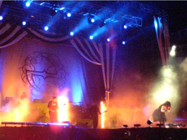 Evanescence en la pista atlética del Estadio Nacional, en Santiago de Chile